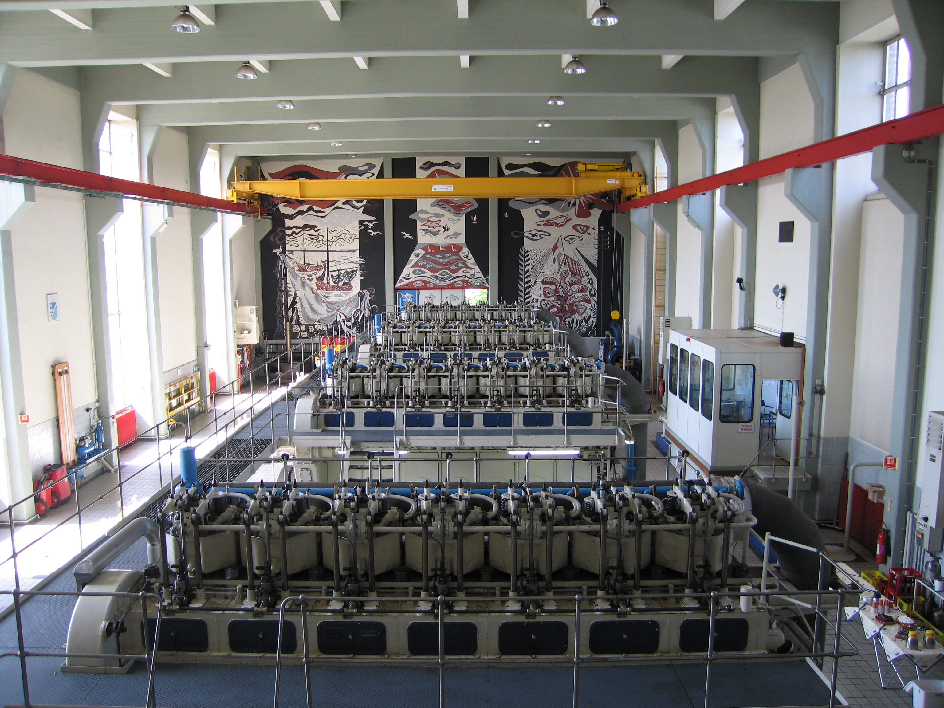 Interieur (machinehal) van Gemaal Wortman, Lelystad